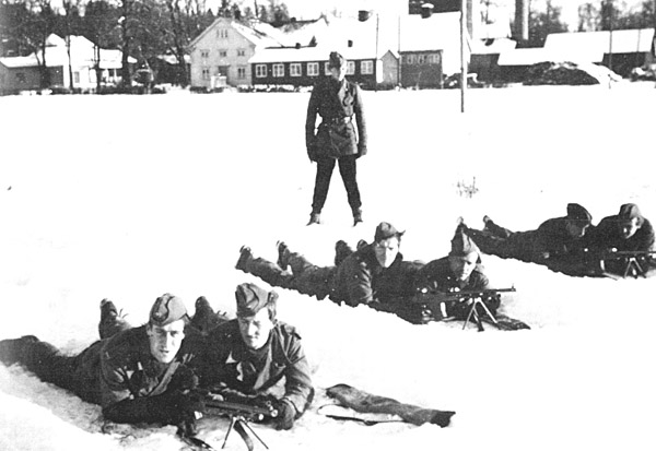 En hemlig dansk operation att träna militärer i exil för att befria Danmark från Nazitysklands ockupation under andra världskriget. Förklädd till "polisskola". Gick under benämningen "DANFORCE". Övningen sker vid kurorten Sätra brunn, där danskarna var logerade. I bakgrunden syns kurortens badhus i "badanstalten. Bild tagen förmodligen 1944.